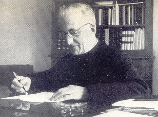 Jean-Baptiste Janssens, 27ème Supérieur Général des jésuites